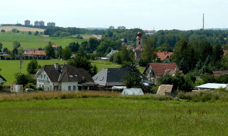 Část obce od jihovýchodu,v pozadí věžáky sídliště Michal Sokolov a vpravo komín Chemické závody Sokolov